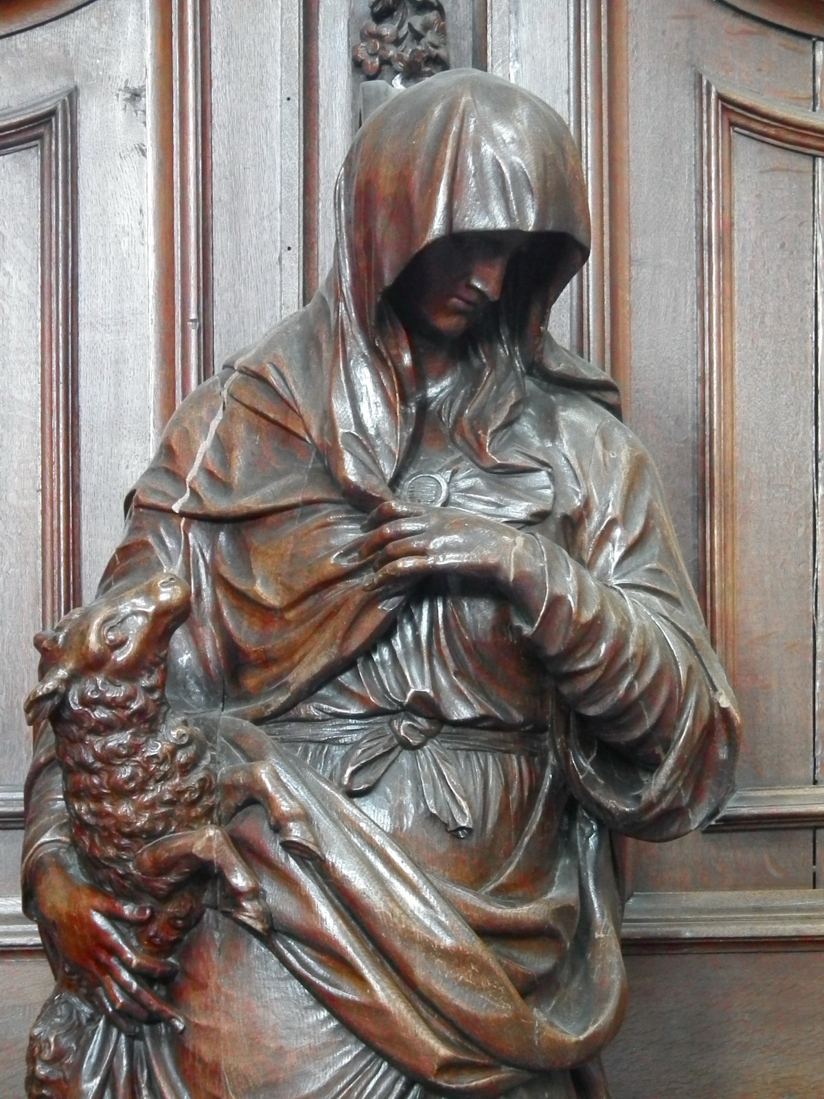 Abbaye de Grimbergen Native nameNorbertijnerabdijkerkLocationGrimbergen, BelgiumCoordinates50° 56′ 00″ N, 4° 22′ 16″ E Website